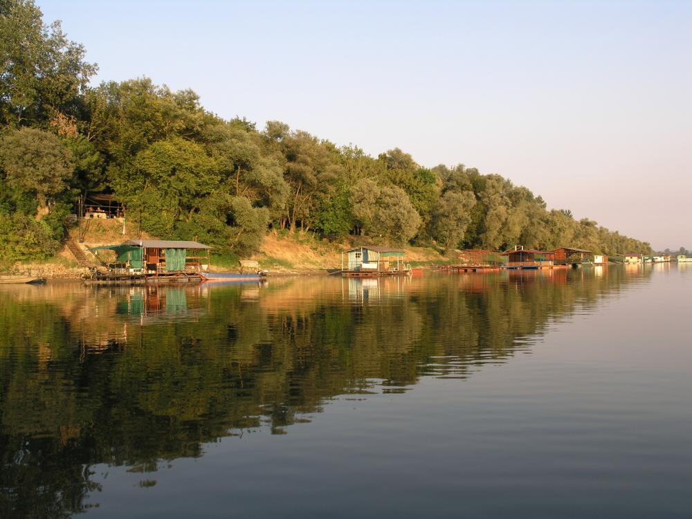 Splavovi na rijeci Savi u Slavonskome Brodu.